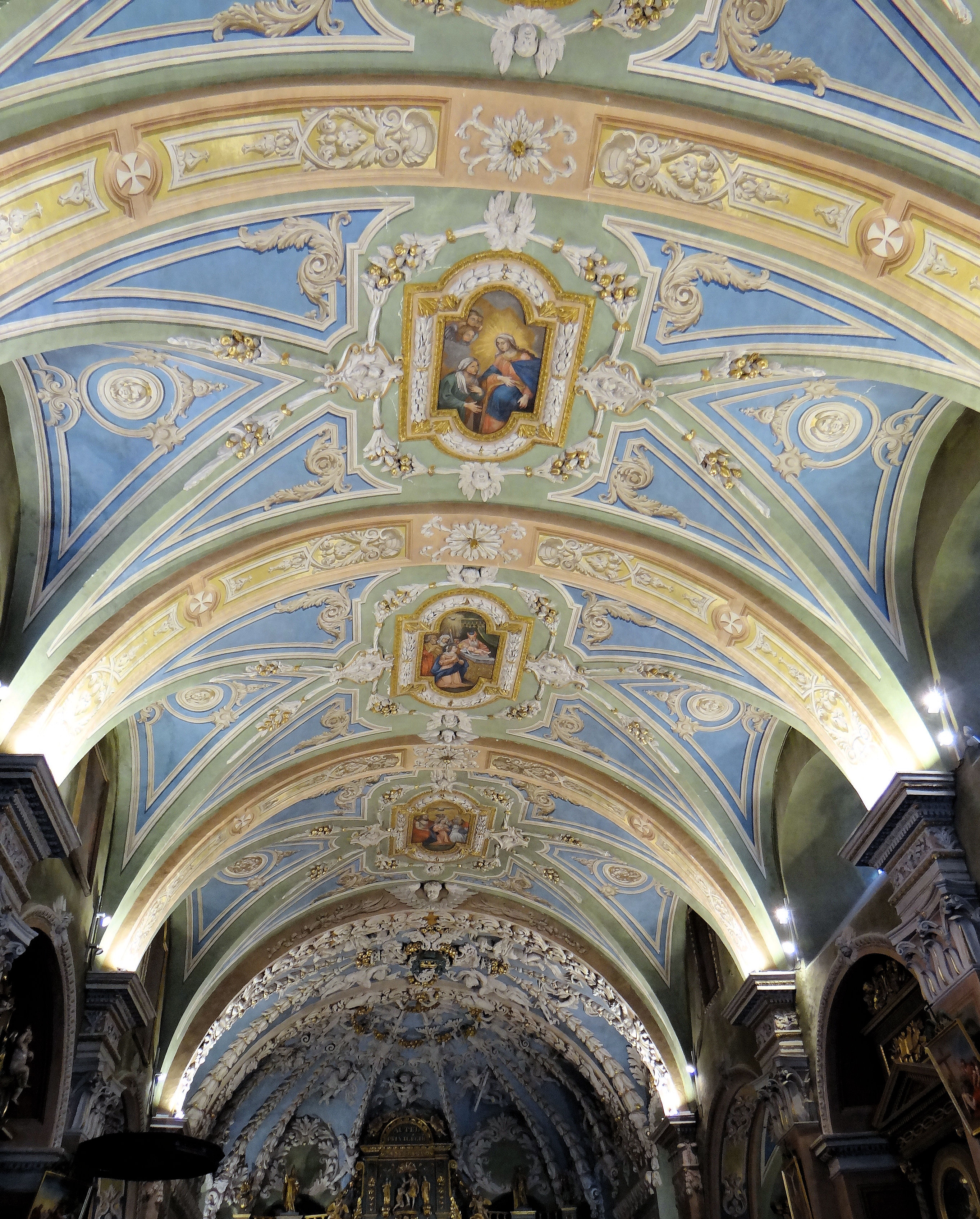 Valloire - Église Notre-Dame-de-l'Assomption - Peinture du plafond .